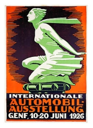 Der Entwurf dieses Plakates schuf der Genfer Plakatgestalter Jules Courvoisier als „Holzschnitt“ in Form von drei Lithosteinen im Jahre 1926. Form und Komposition dieses klassischen Art Déco Plakates war zur damaligen Zeit höchst avantgardistisch. Ein seltenes Plakat für den Internationalen Automobilsalon in Genf, der 1926 zum dritten Mal stattfand.